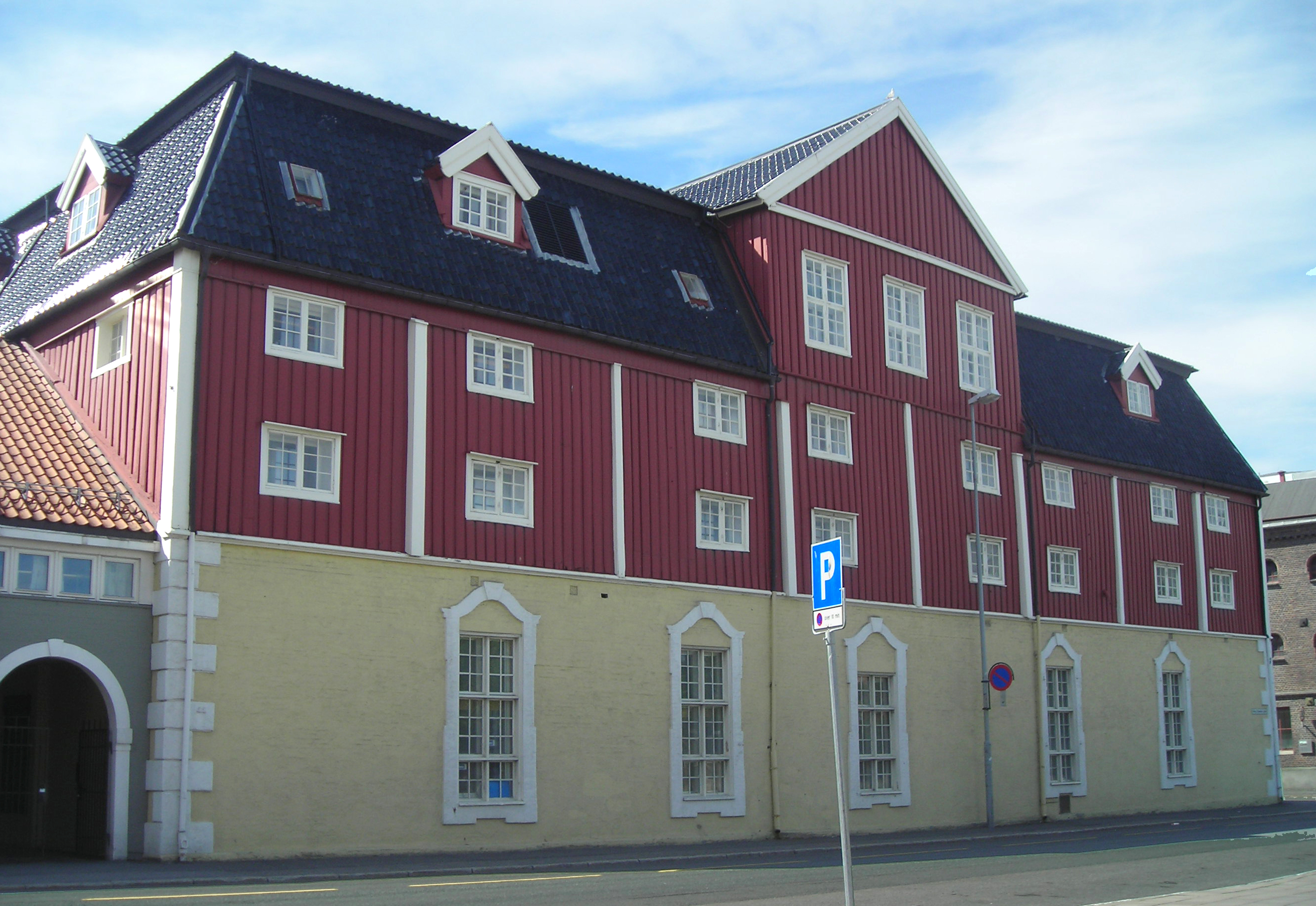 Sukkerhuset in Trondheim, built in 1754